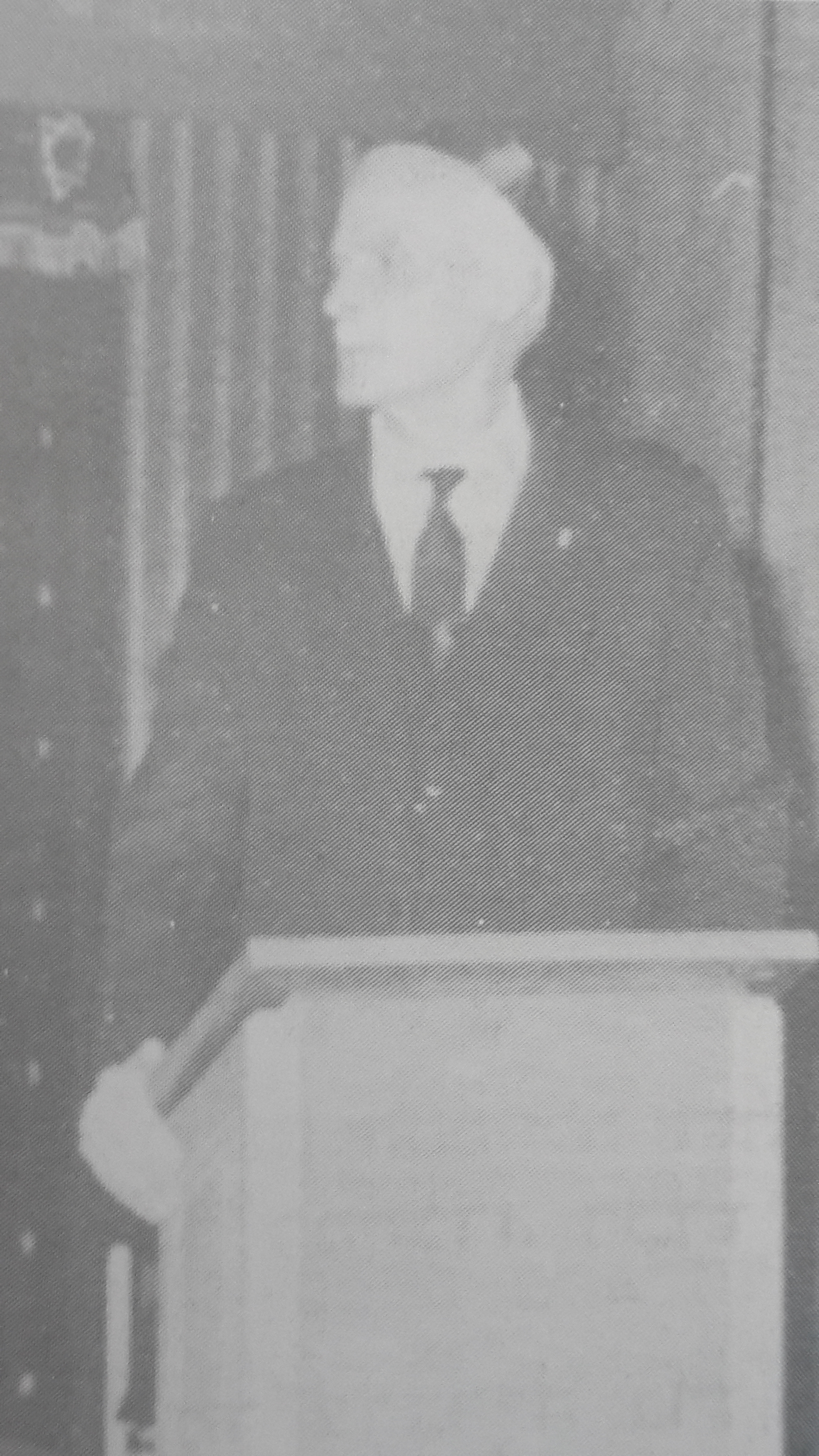 סעד מלכי נושא דברים בטקס קבלת אות יקיר העיר בת ים